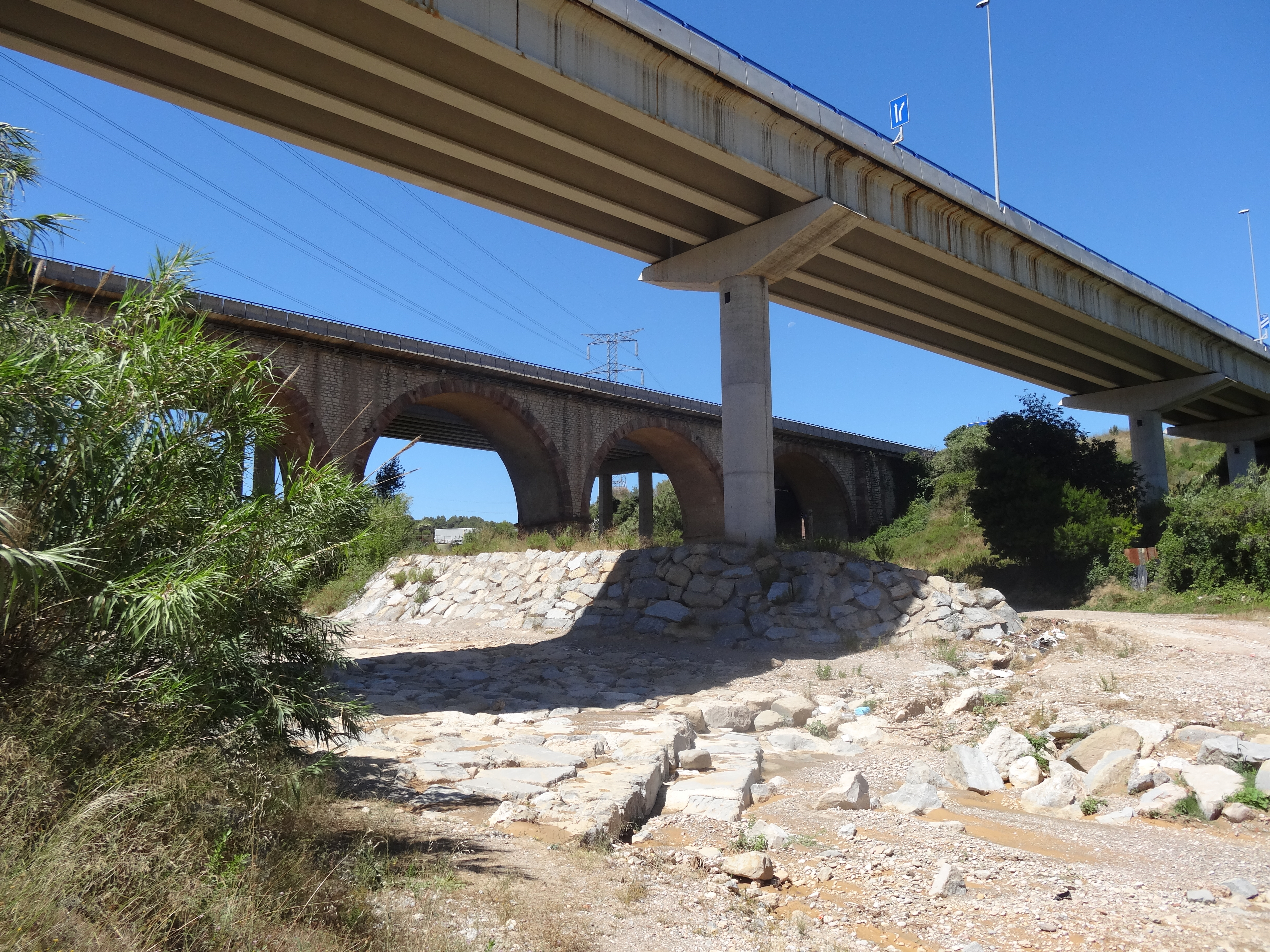 Al fons, viaducte i pont de l'A2 sobre la riera de Magarola. En primer terme, viaducte que connecta Abrera, a l'esquerra, amb Esparreguera, a la dreta, per sobre la riera de Magarola.